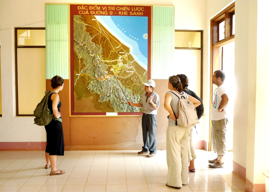 Trình bày của HDV